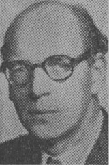 Arkitekten Curt Laudon